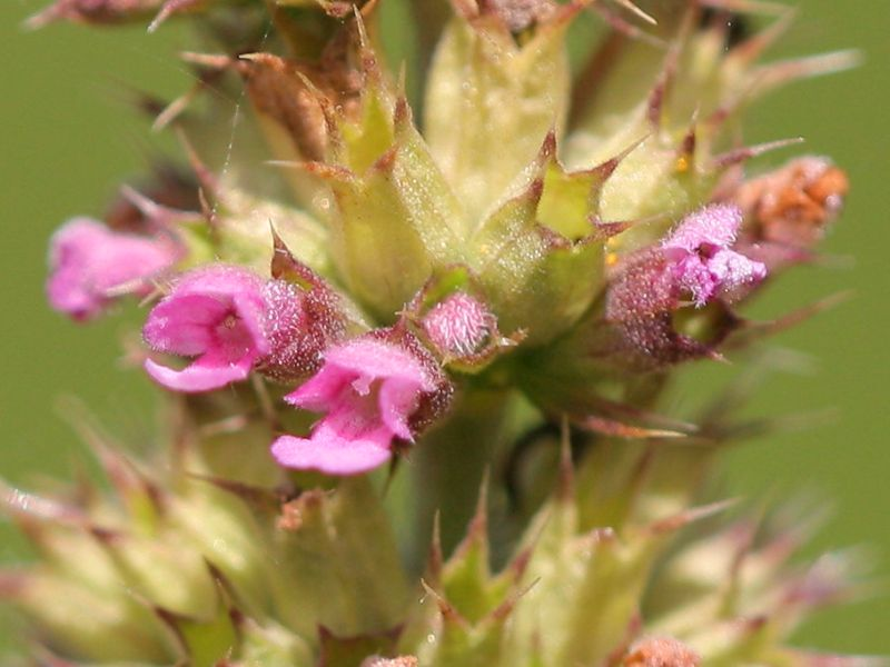 Filziges Herzgespann (Leonurus marrubiastrum)